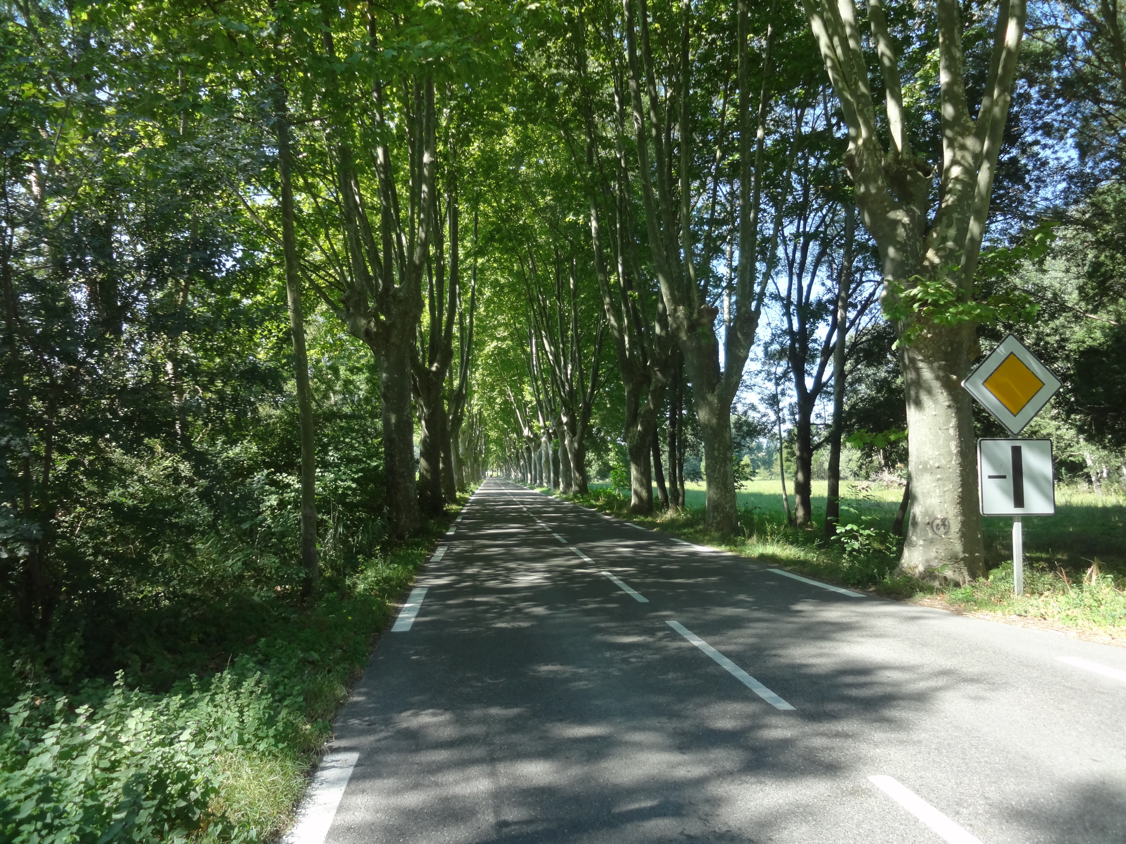 Route nationale 100 1500 m à l'est de la sortie de Céreste, entre deux alignements de platanes